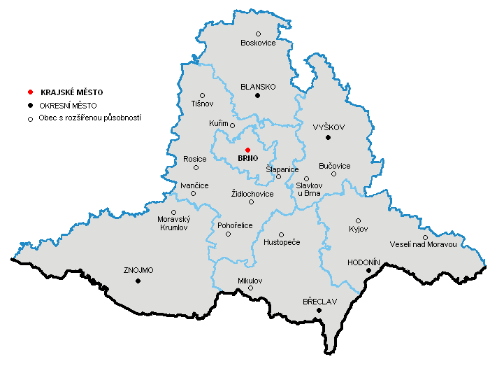 Bezirke des Jihomoravsky Kraj in Tschechien